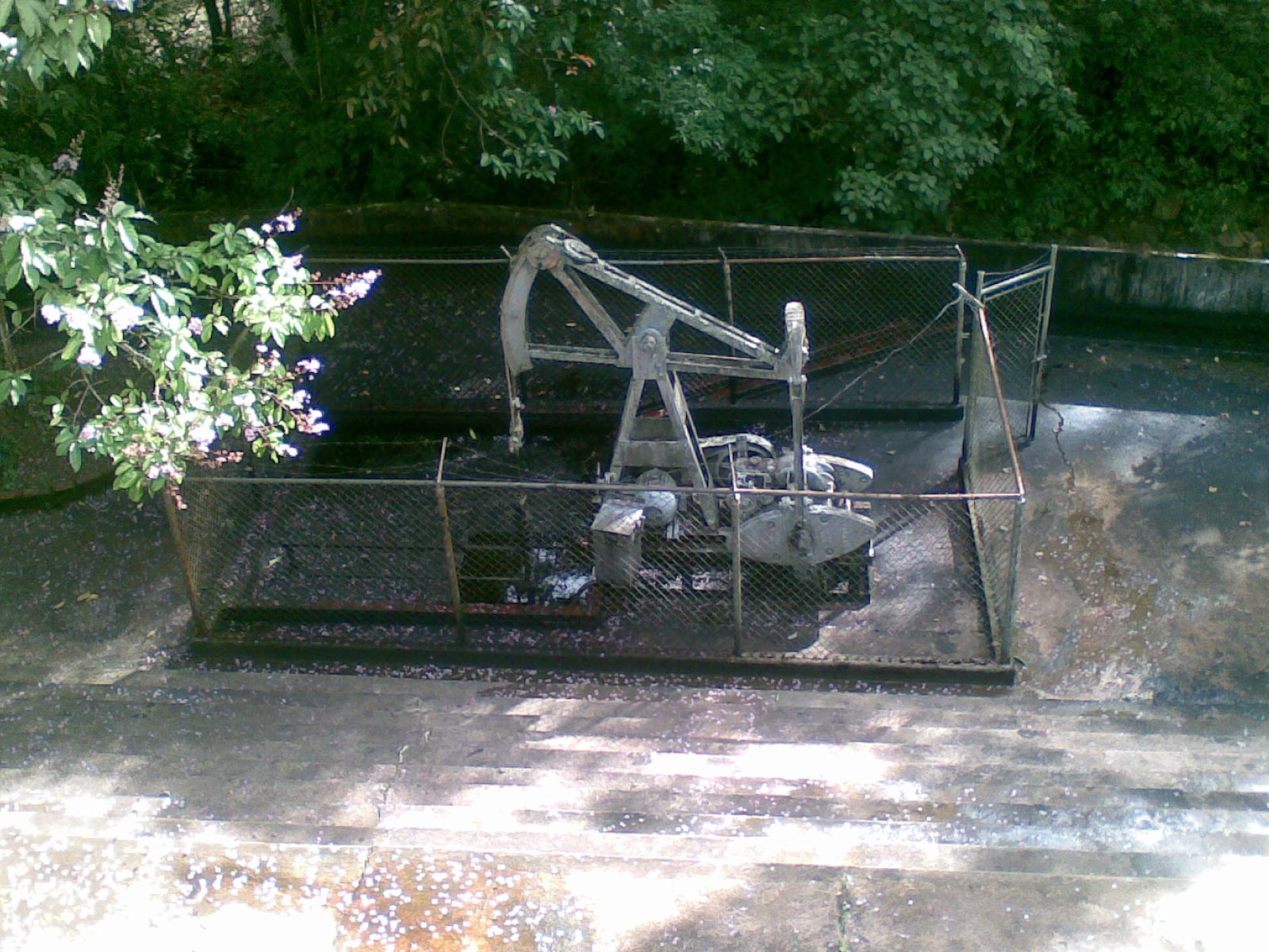 Primer pozo petrolero con producción industrial en Venezuela, donde se originó la industria petrolera. Esta ubicado en el Estado Tachira, específicamente en el municipio Junín, "Parque La Petrolea"